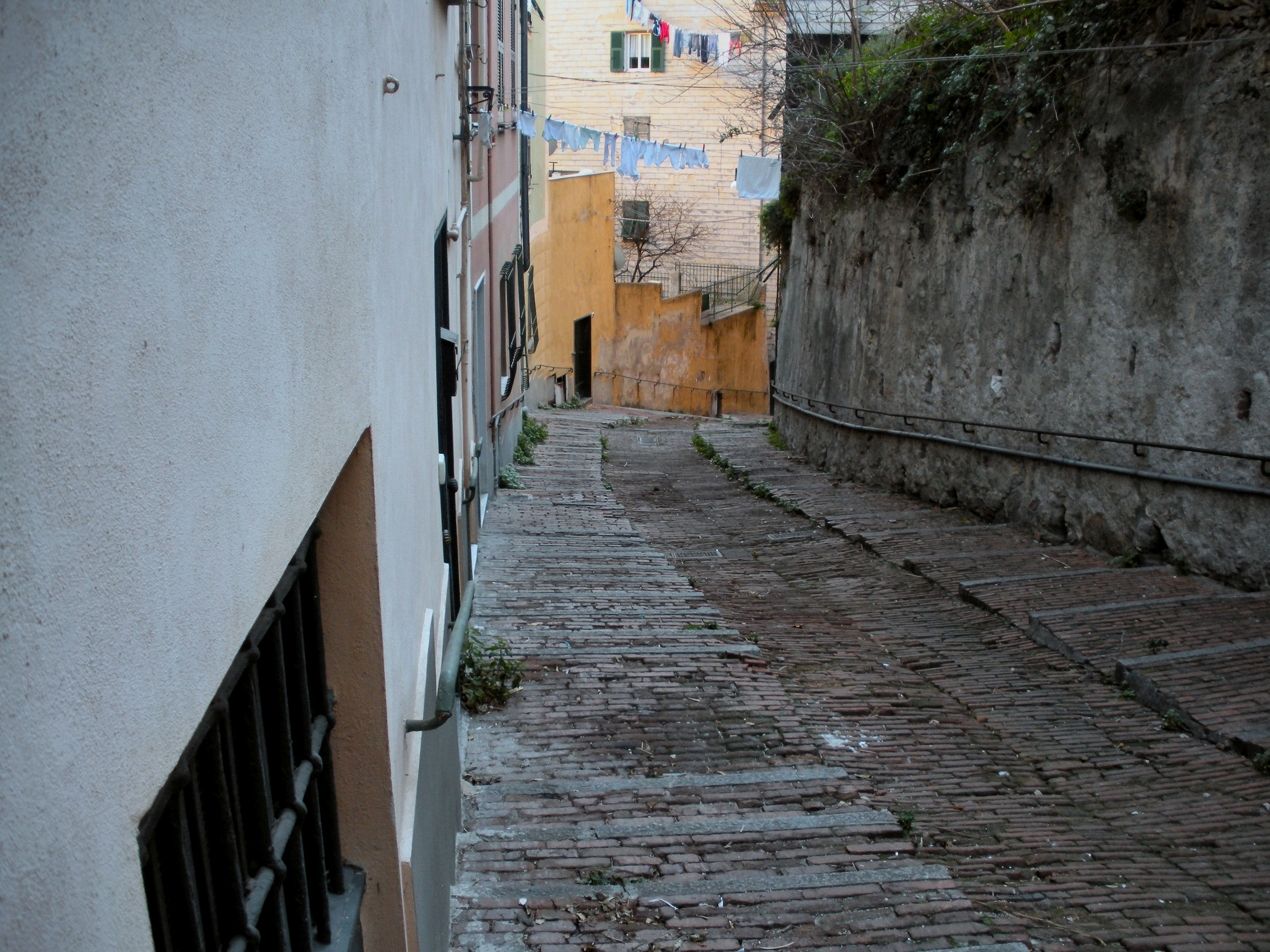 Genova, quartiere di San Teodoro, salita degli Angeli